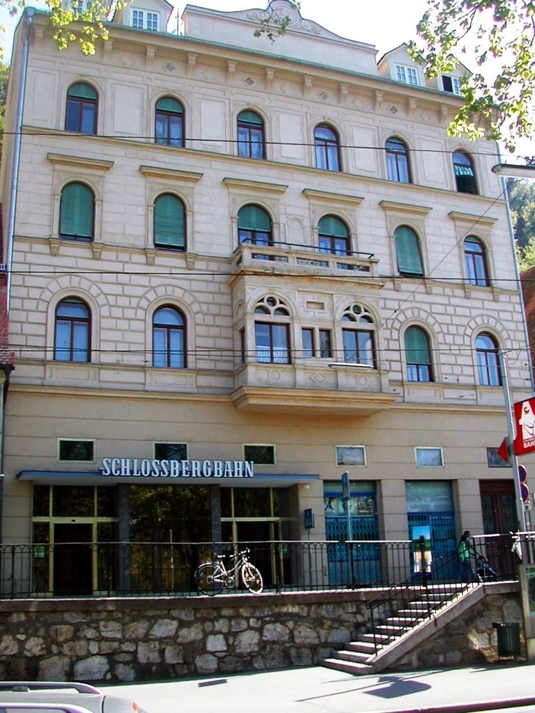 Gebäude Grazer Schloßbergbahn